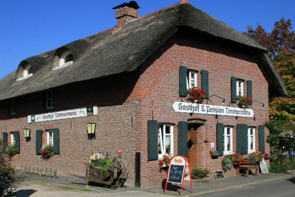 Landhaus Timmermanns in Wegberg-Schwaam